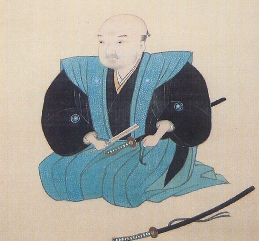 山鹿素行 Yagama Sokou.